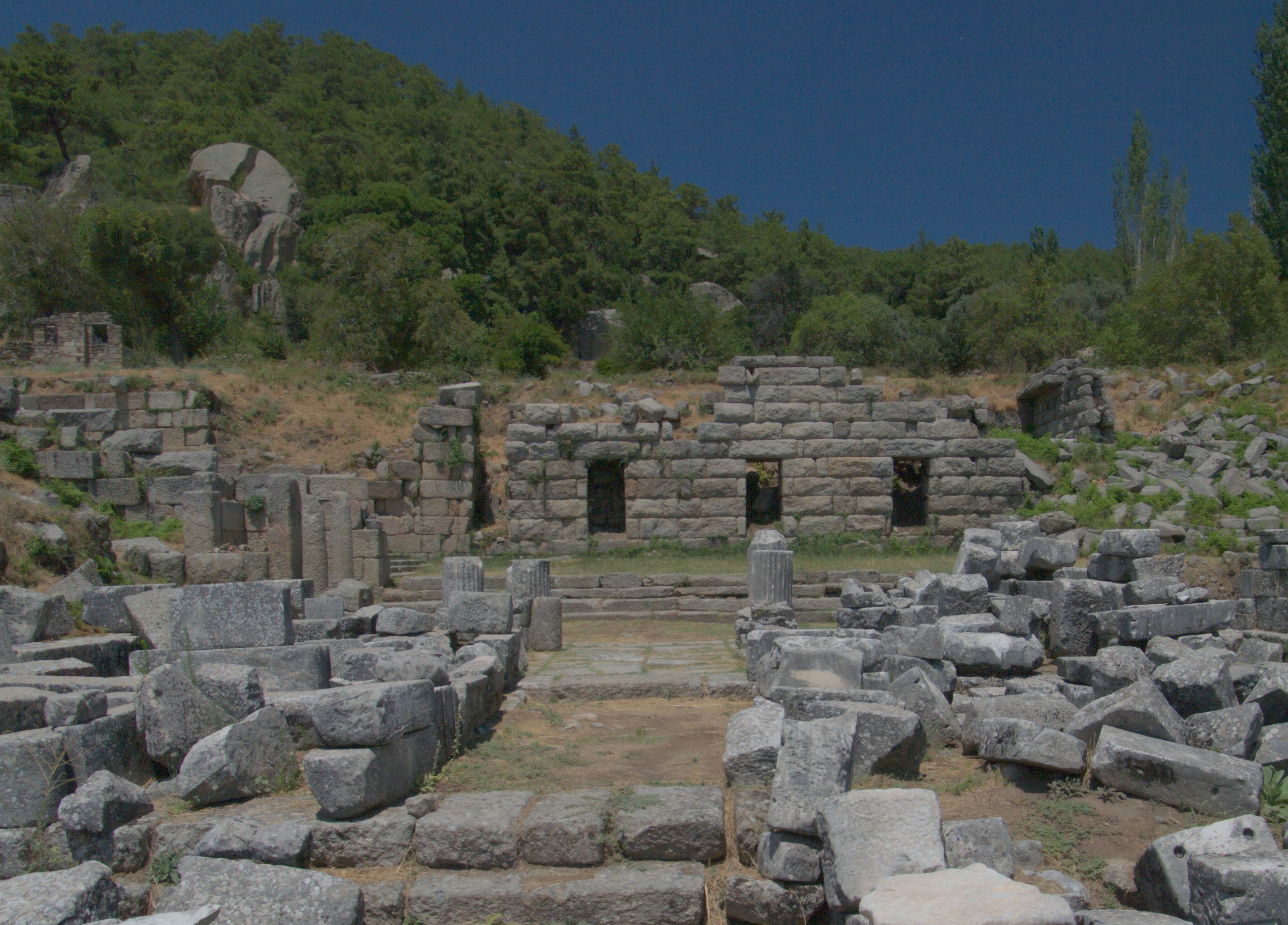 Лабранда. Южные пропилеи